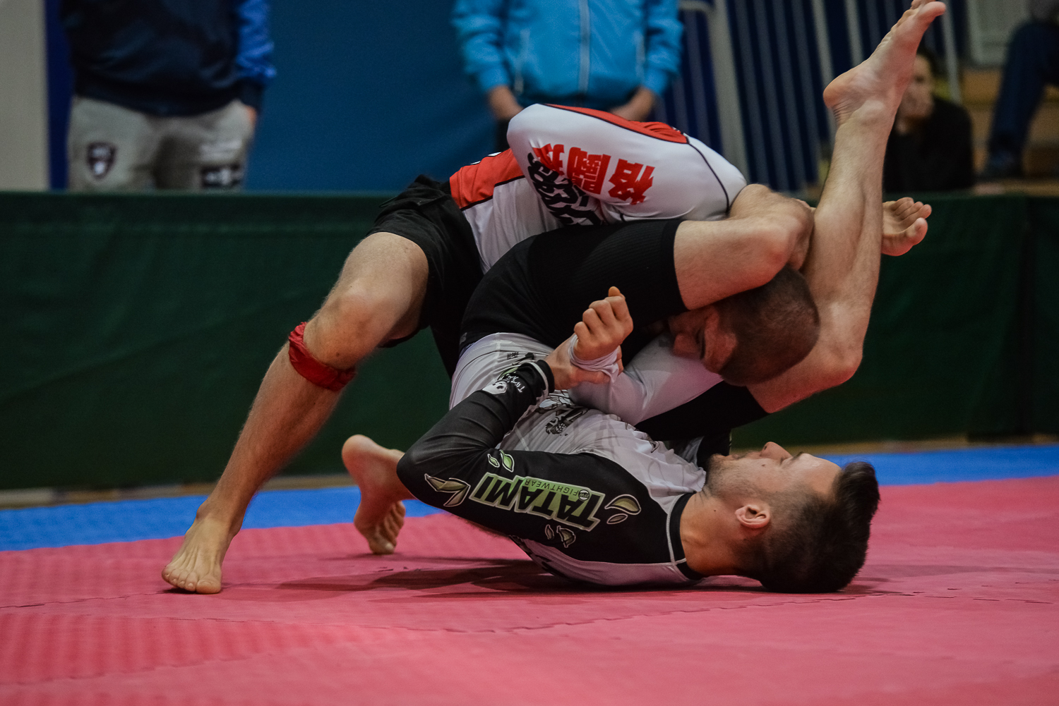 Napadalec zapira trikotnik